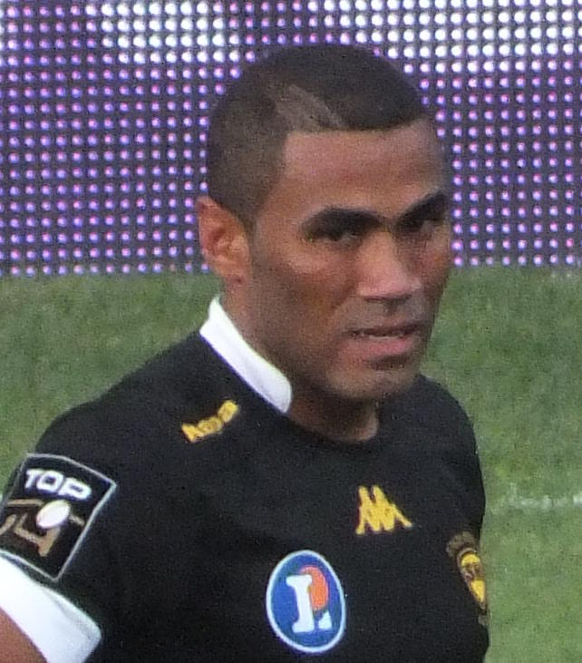 Top 14 — 25 August 2012, Stade Ernest-Wallon. Match between: Stade toulousain — Stade montois